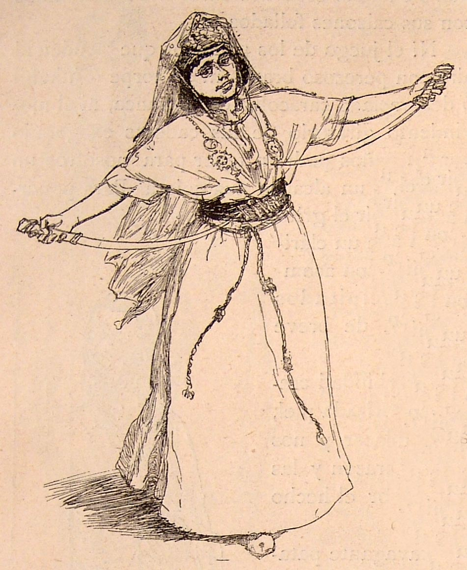 Uled-Nail ejecutando el baile de los sables.